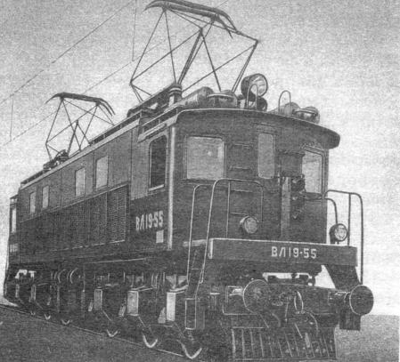 Электровоз серии ВЛ19